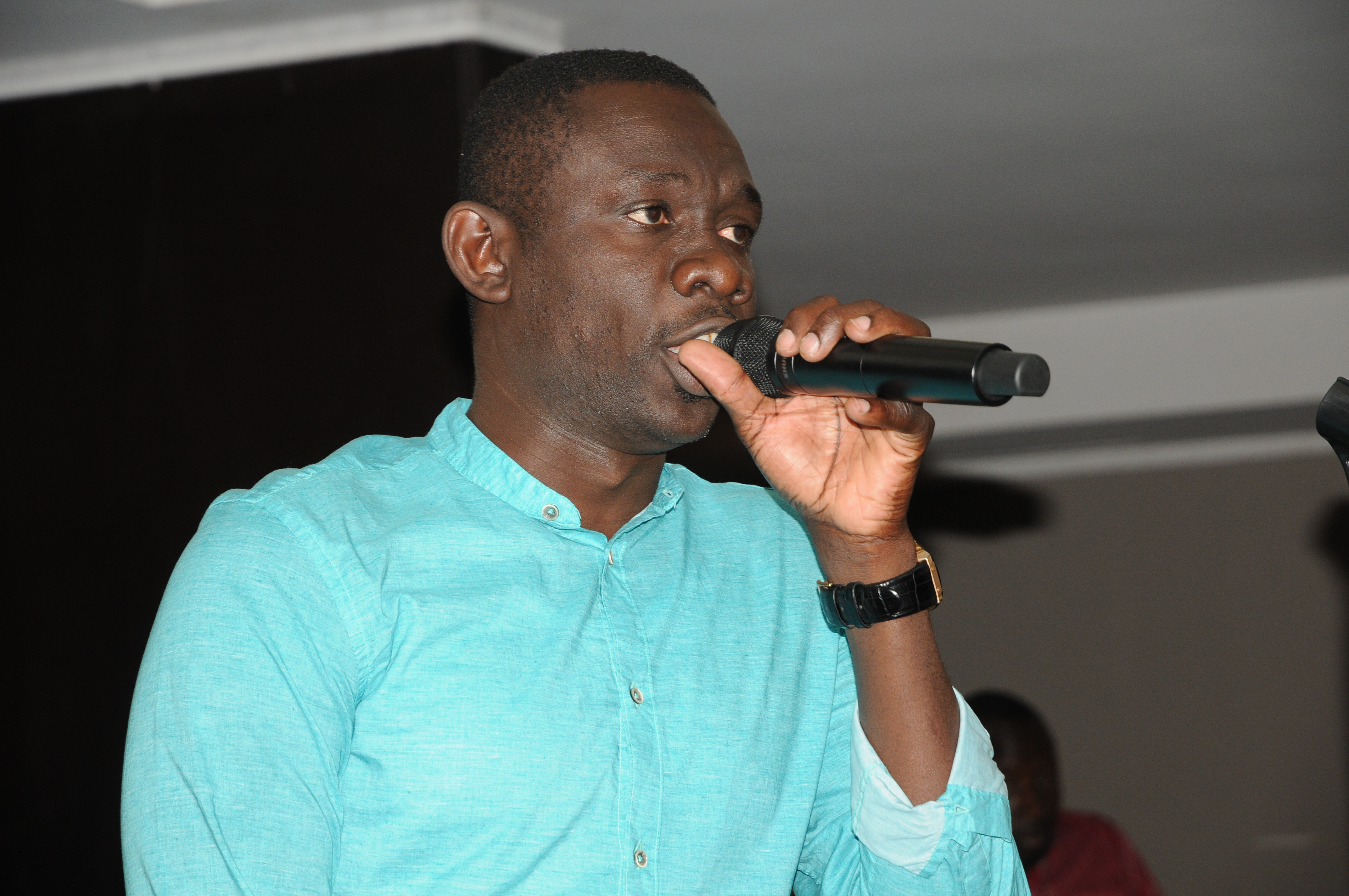 artiste musicien